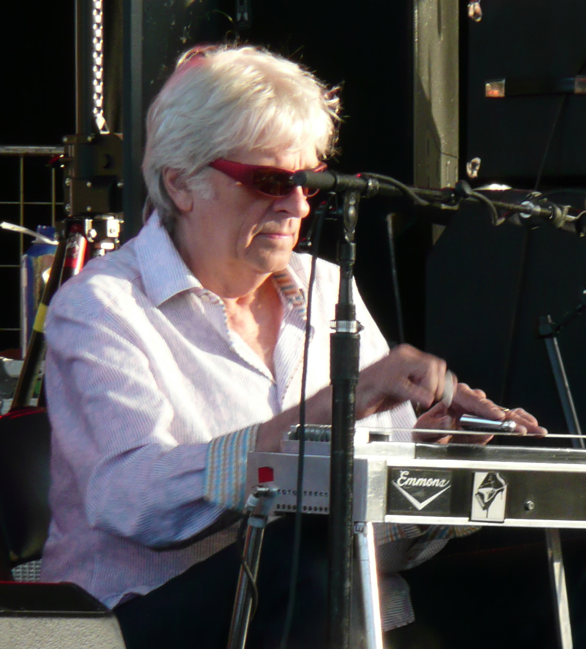 Steelgitarrist Ben Keith bei Neil Youngs Konzert am 19. Juni 2009 am Kölner Tanzbrunnen